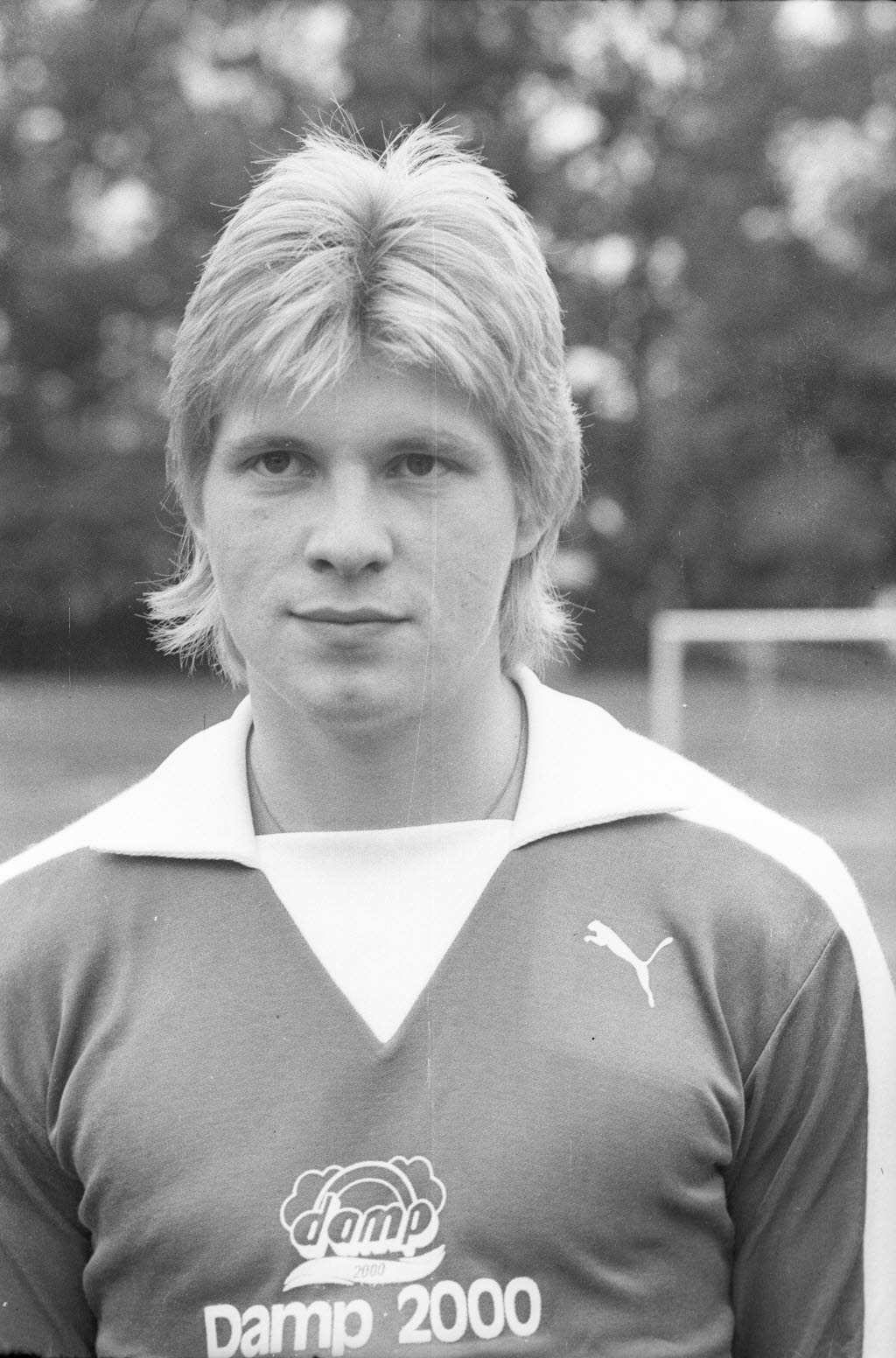 Fußballspieler von Holstein Kiel in der Saison 1978/79.